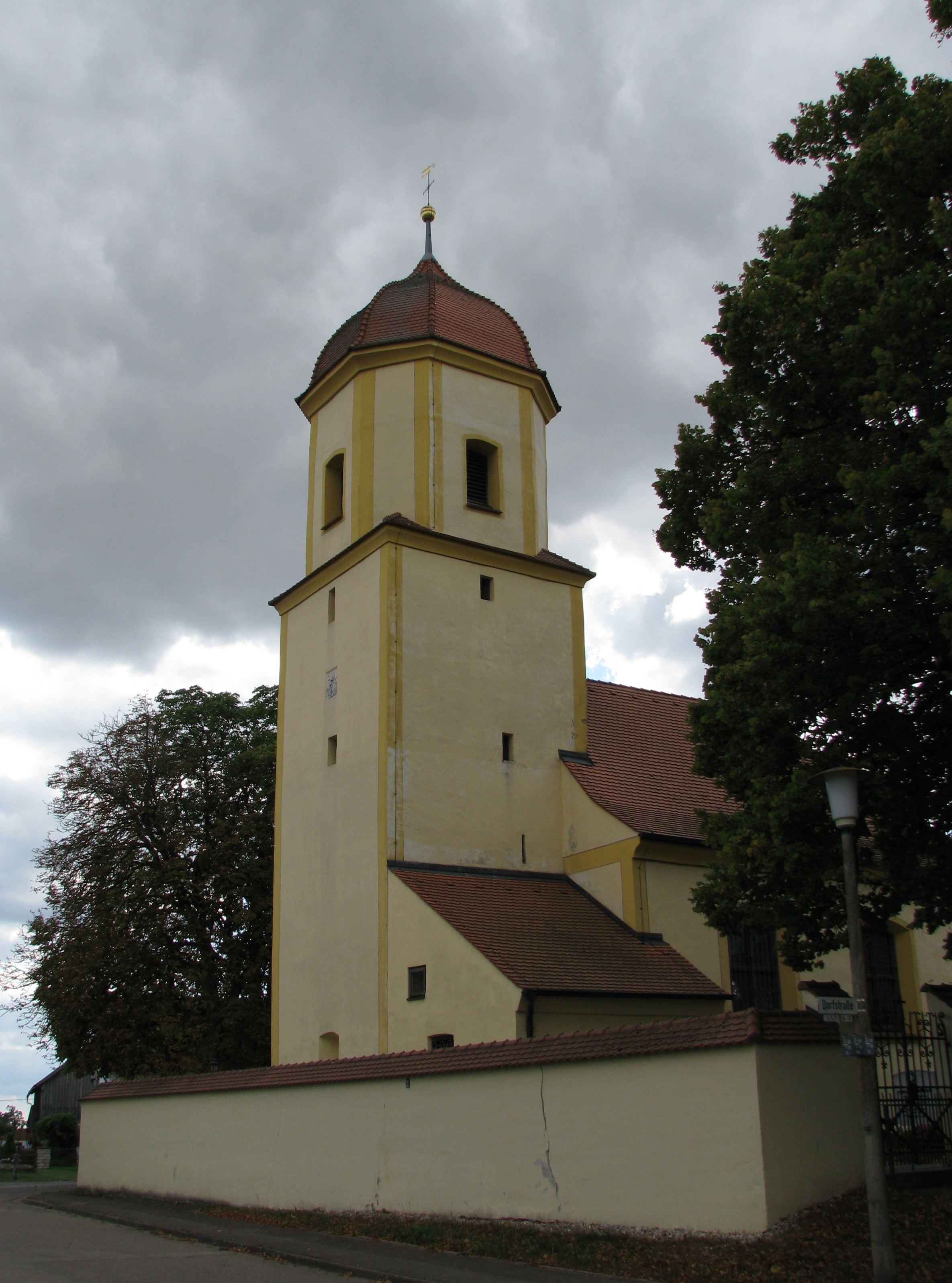 Esselberg, Ortsteil der Stadt Greding im mittelfränkischen Landkreis Roth in Bayern, Kath. Filialkirche St. Nikolaus